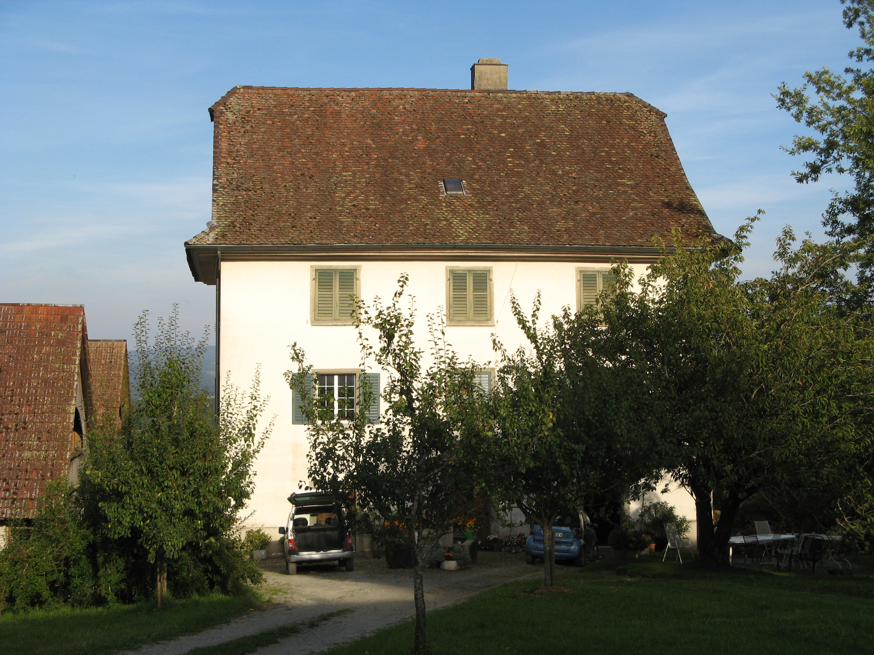 Wohnhaus des Sentenhofes bei Boswil (Baujahr 1759)